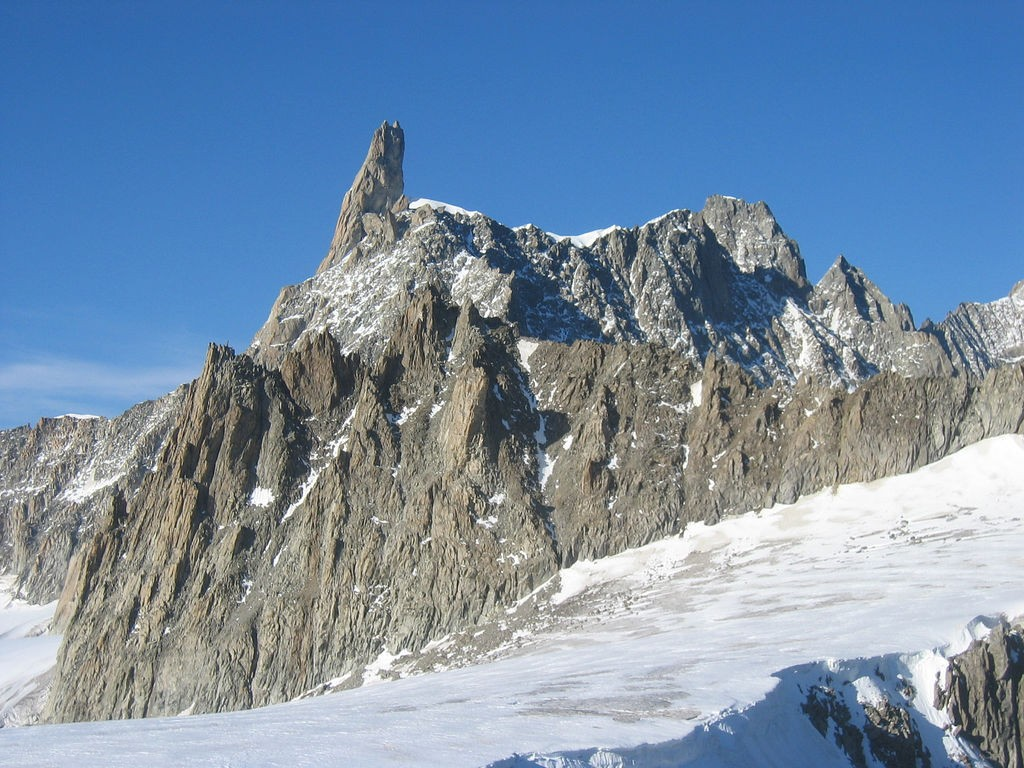 Dent du Géant (Dente del Gigante) (4013 m)